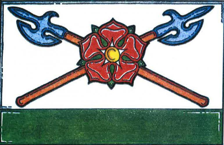 vlajka, Strážkovice, okres České Budějovice